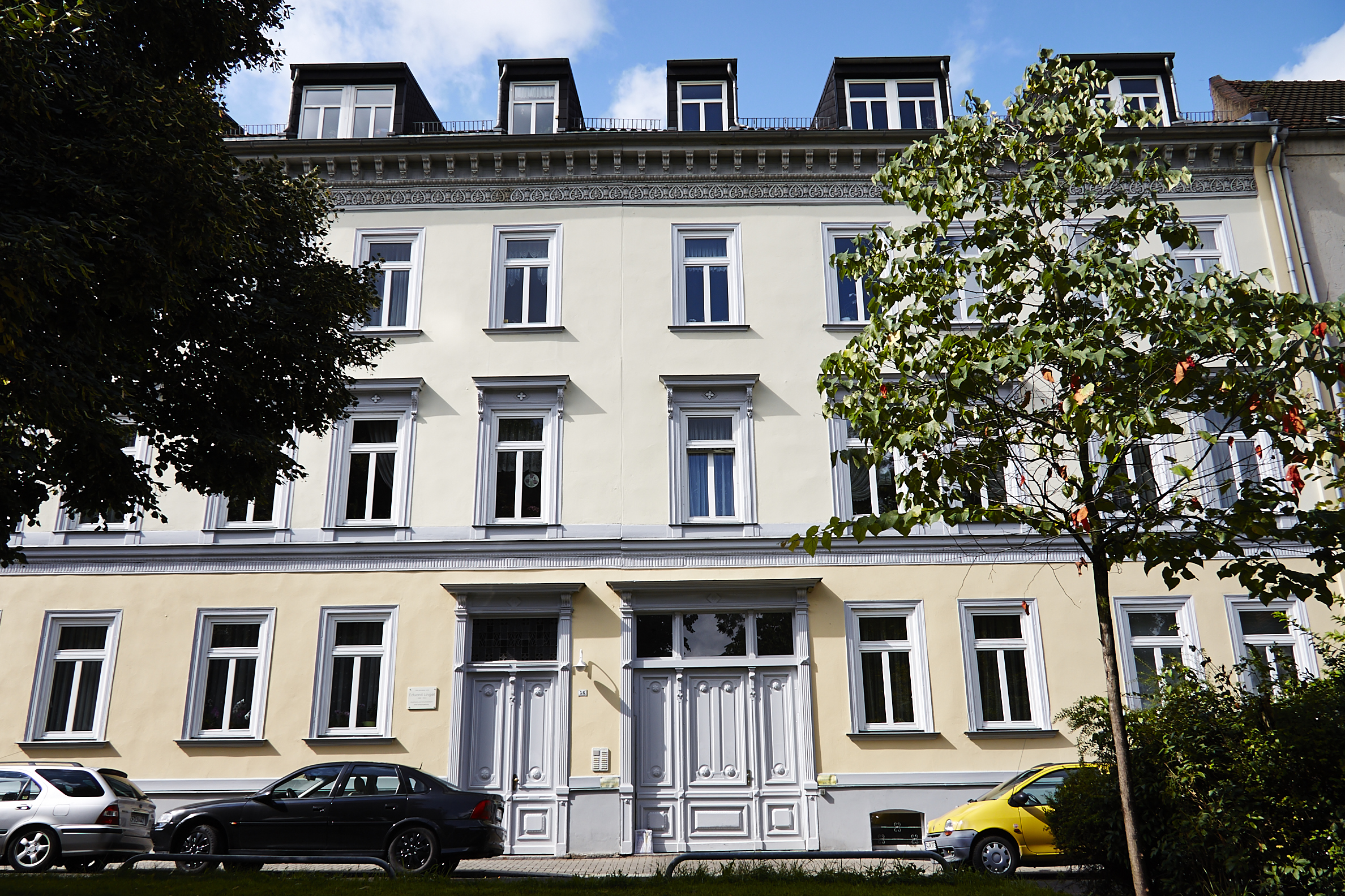 Erfurt, Herrmannsplatz 5 und 6, Vorderansicht